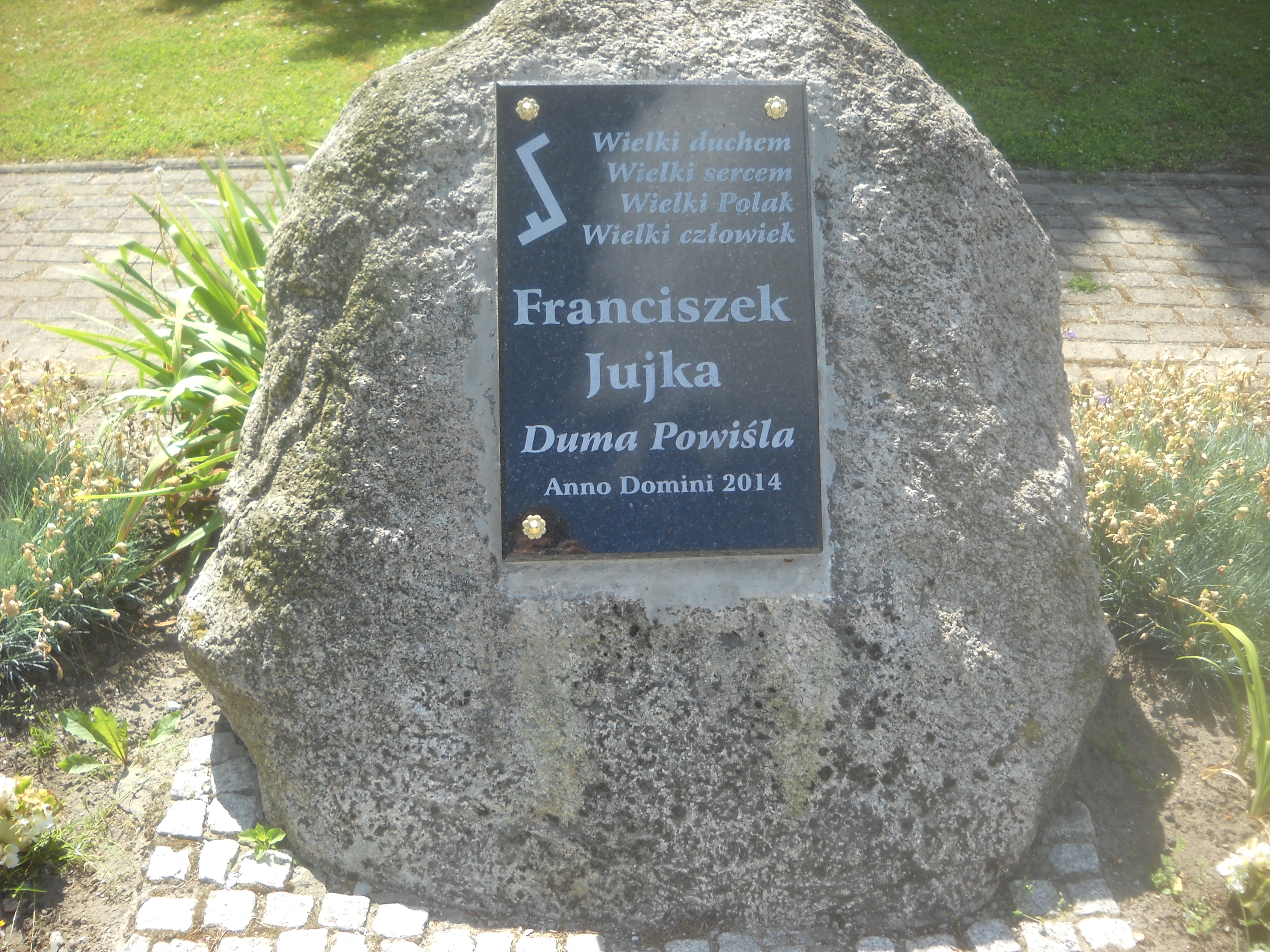 Pomnik Franciszka Jujki przed Zespołem Szkół w Starym Targu